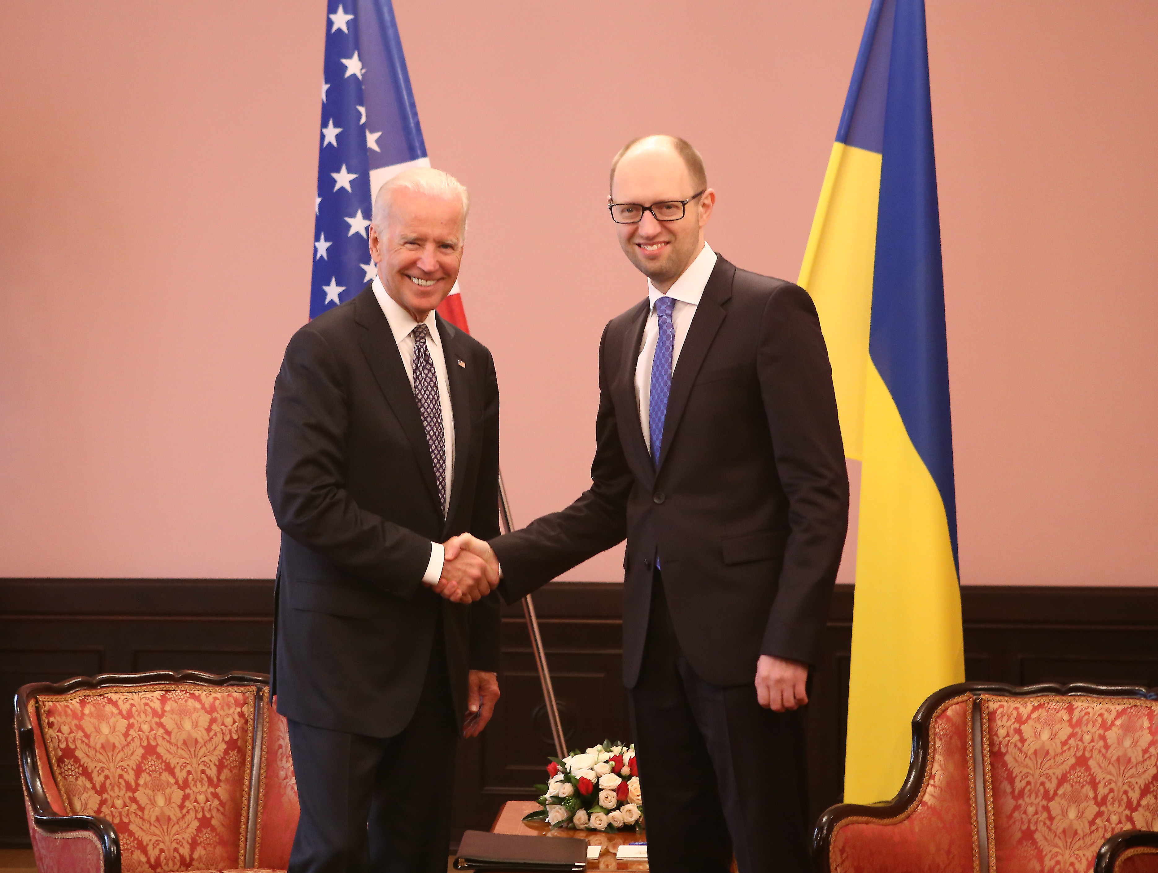 VP Biden meets PM Yatsenyuk in Kyiv, Ukraine, April 22, 2014